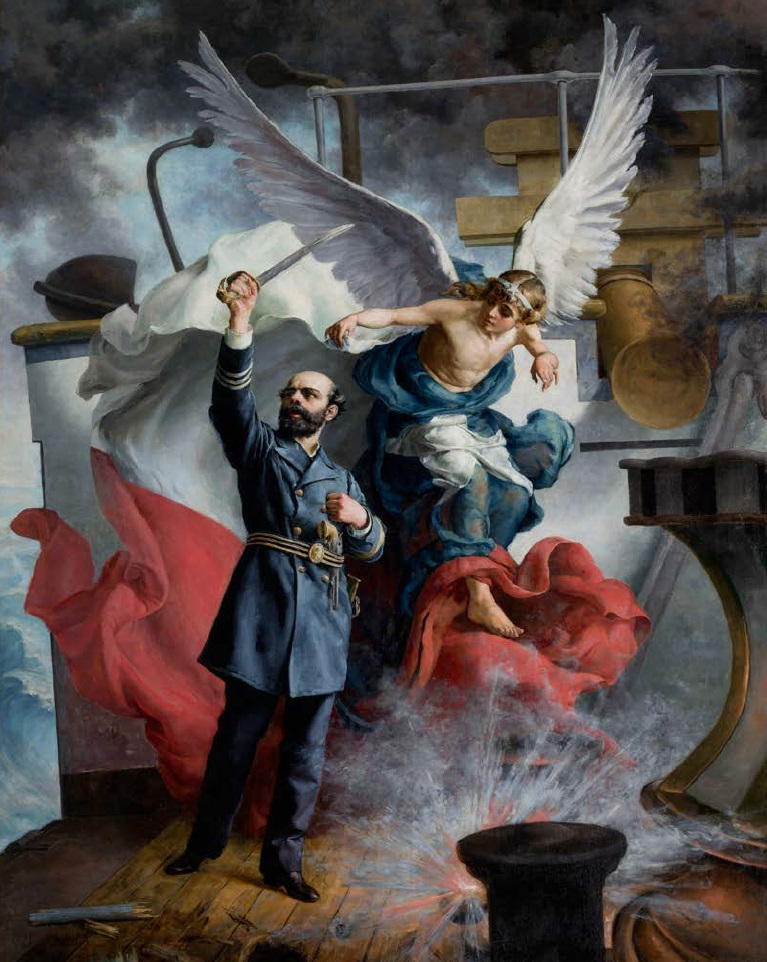 "Prat guiado al sacrificio guiado por el genio de la Patria cuadro de Cosme San Martín. El cuadro representa al héroe chileno en sus últimos momentos, acompañado por un ángel de la victoria, con los símbolos republicanos de la estrella en la frente y la bandera nacional."